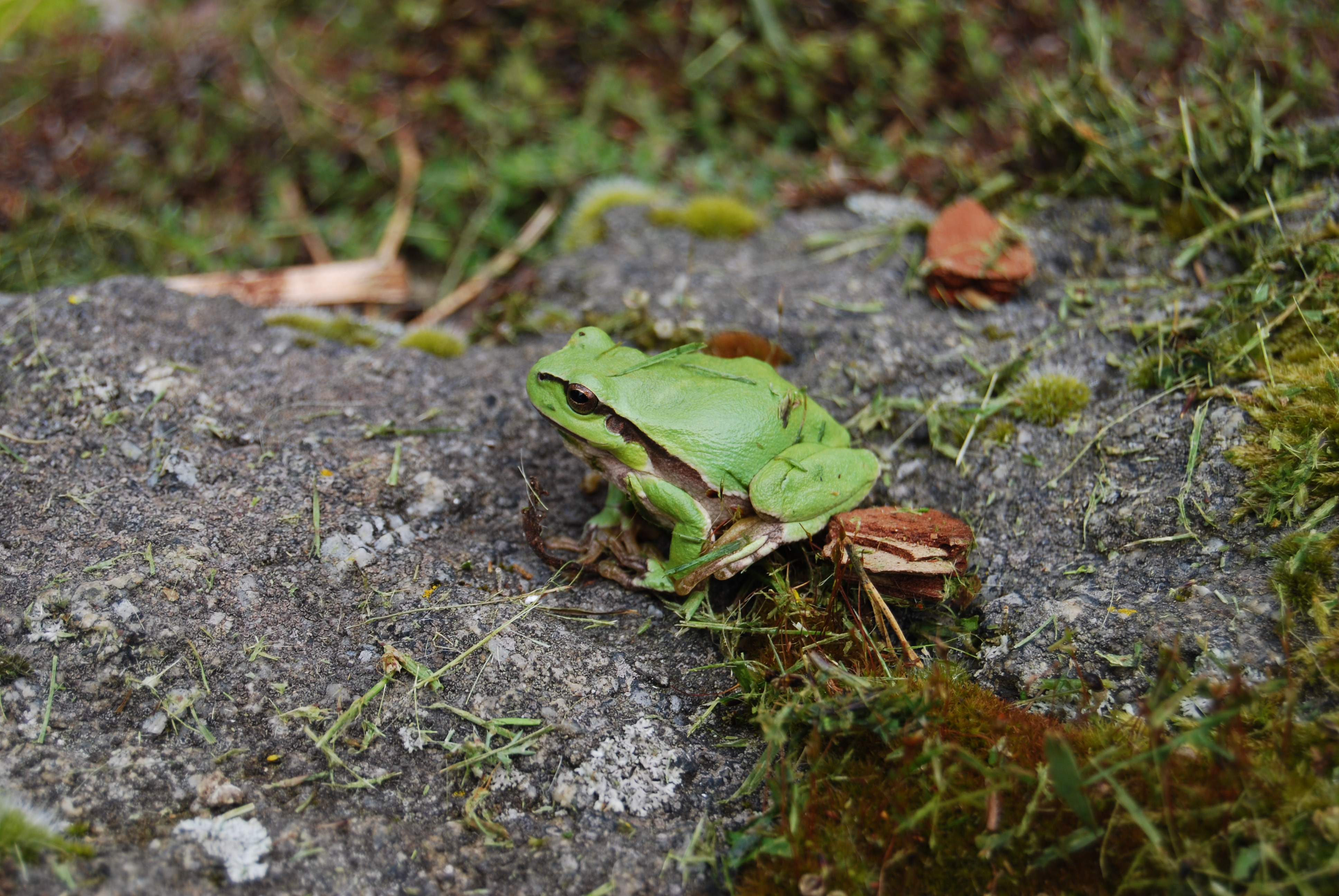 Rosnička zelená - (Hyla arborea). Jihočeský kraj. Ćeská republika.